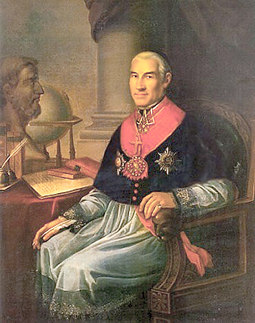 Hieronim Stroynowski